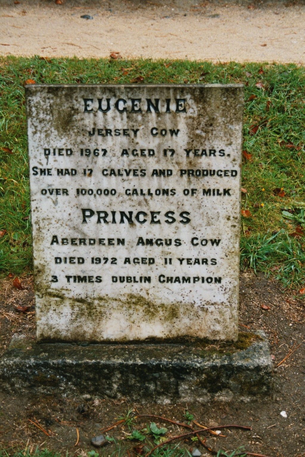 Haustierfriedhof Powerscourt Gardens Ireland Source: eigene Aufnahme (2003)